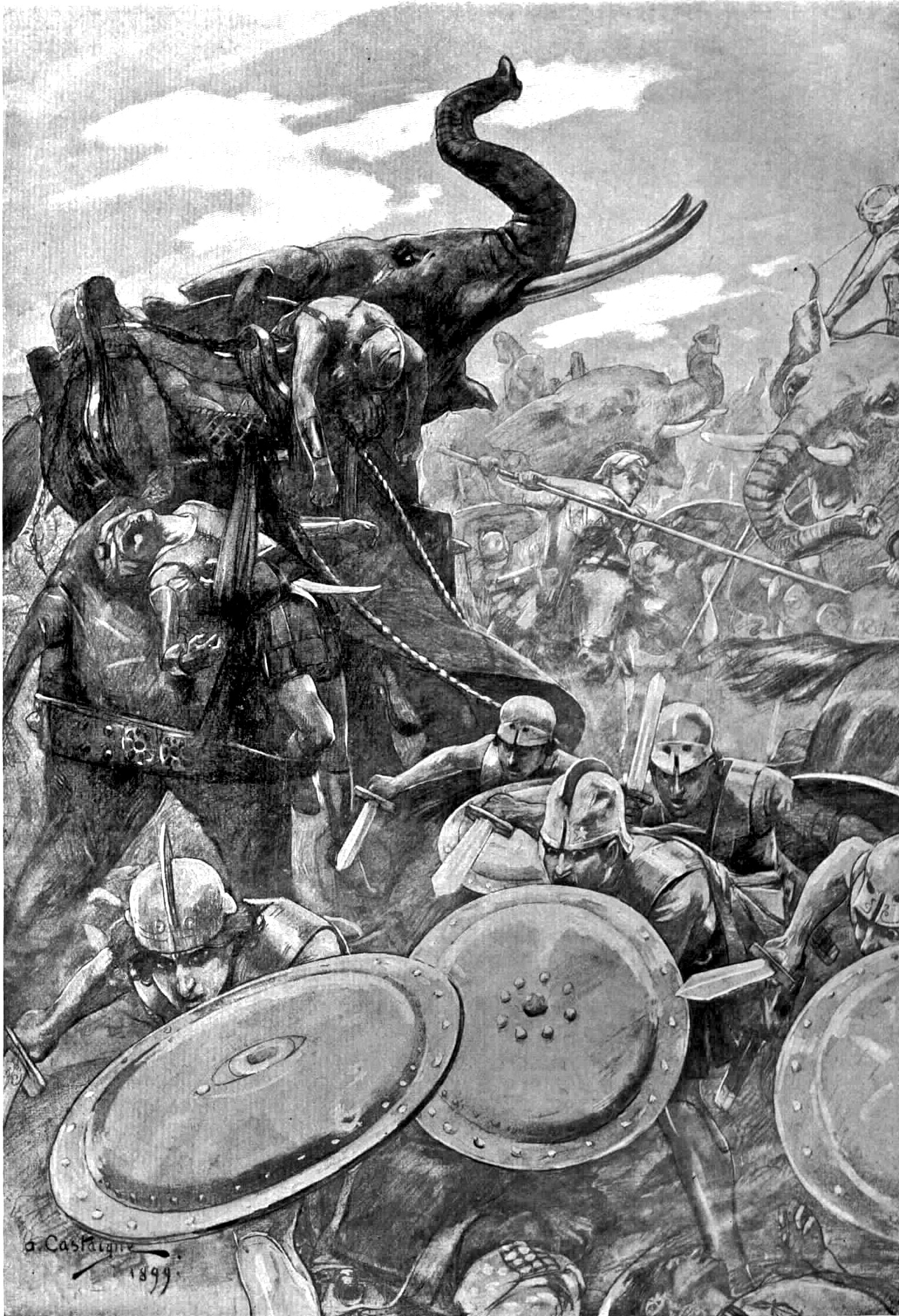 Alexander old drawings